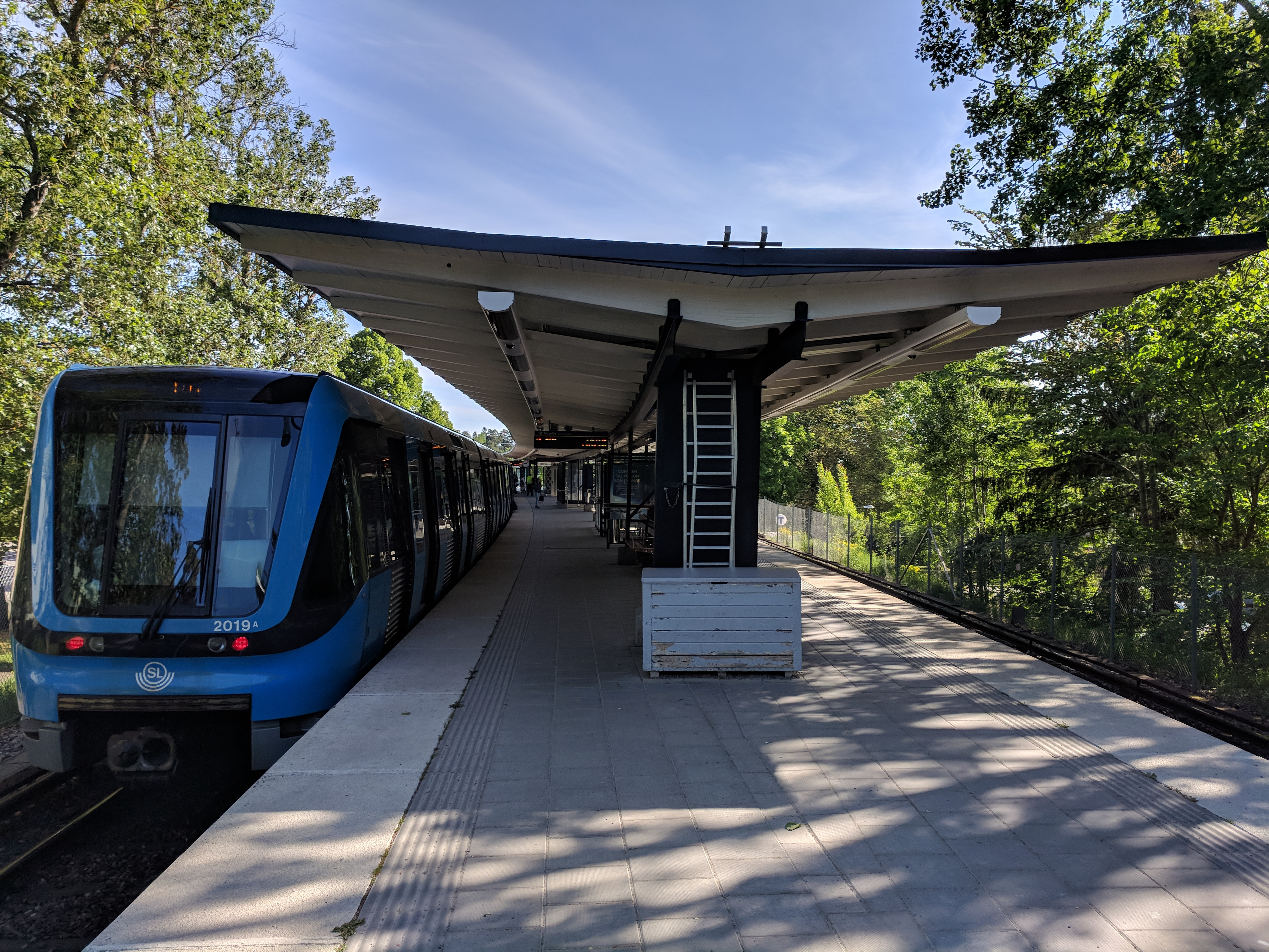 Svedmyra metro